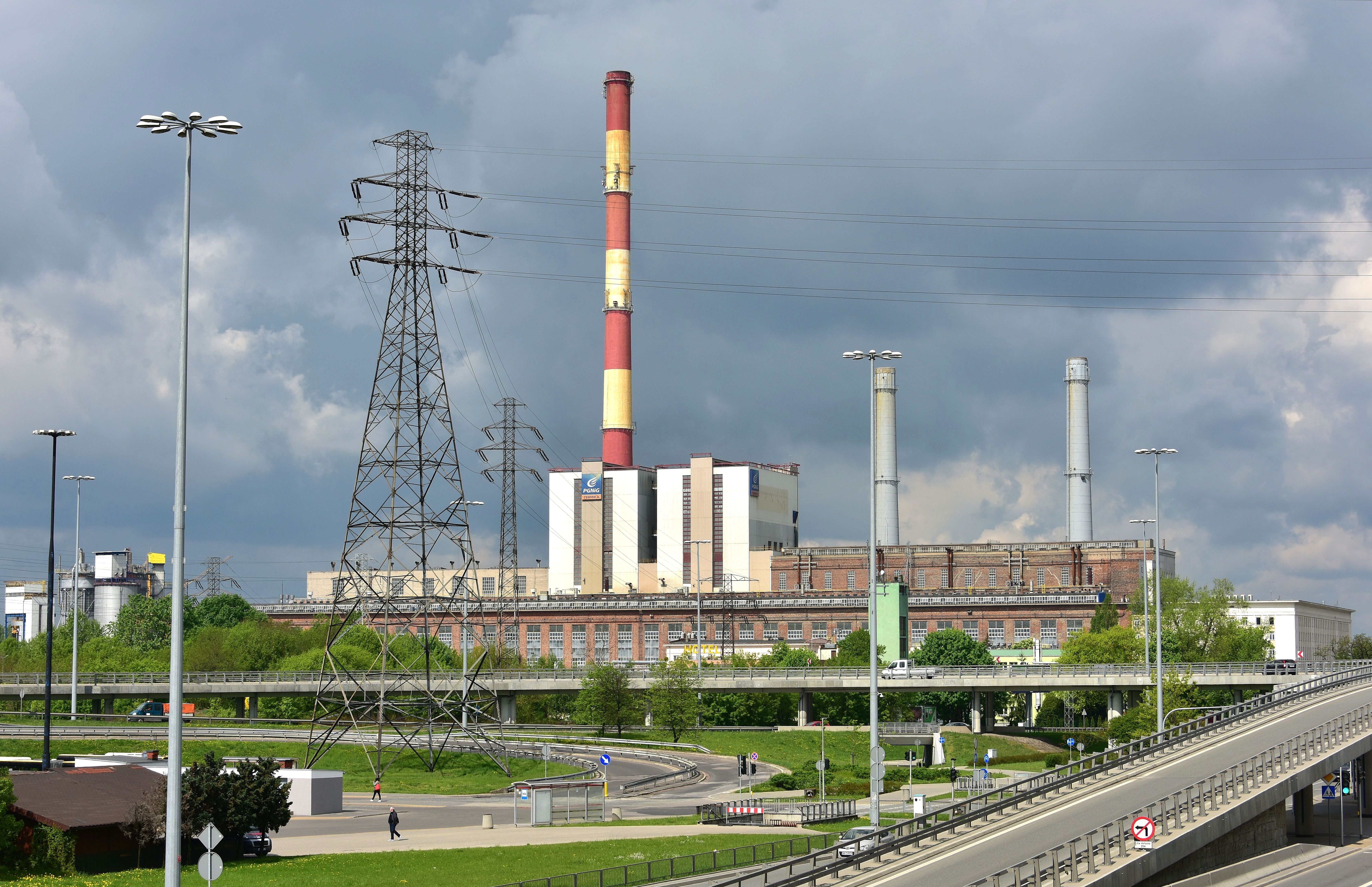 Elektrociepłownia Żerań widziana z wiaduktu Trasy Toruńskiej